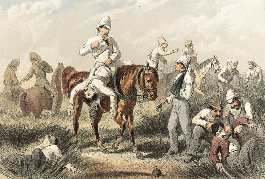 Soldats britanniques recherchant des blessés sur un champ de bataille pendant la révolte des cipayes, 1857-1858. Gravure du XIXème siècle.